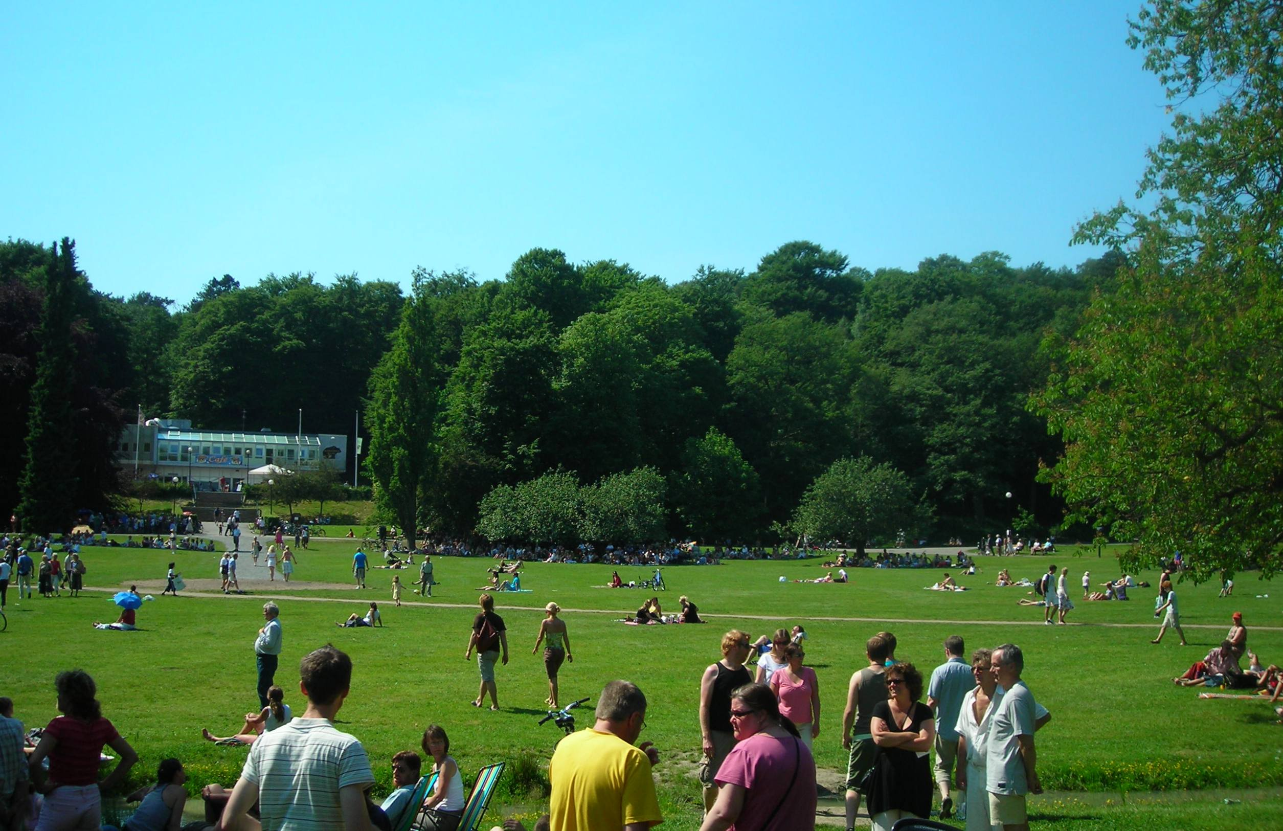 The park Slottsskogen in Gothenburg, Sweden